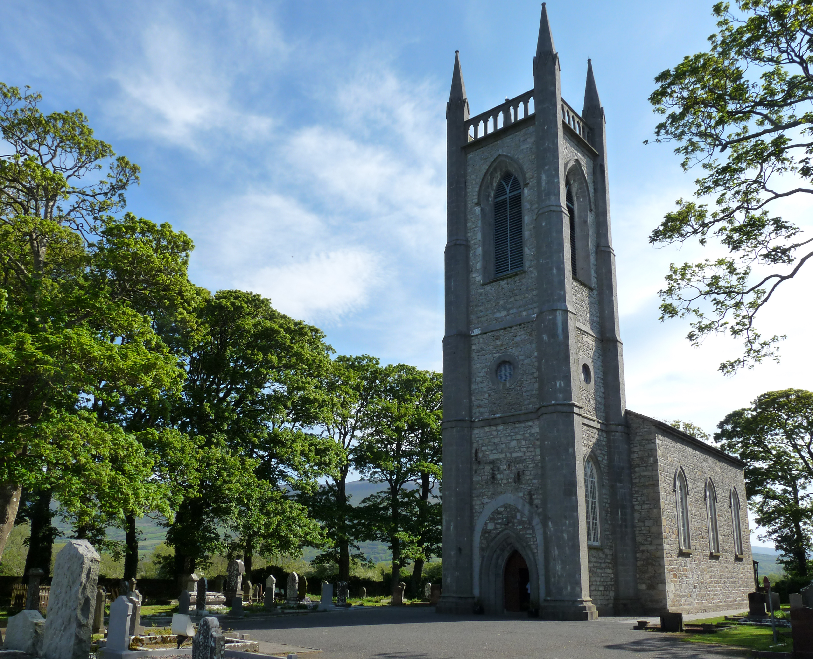 Drumcliffe Church